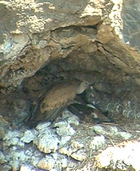 An Eagle feeding its young at Gamla in Summer 2005 - digiscope image via binoculars